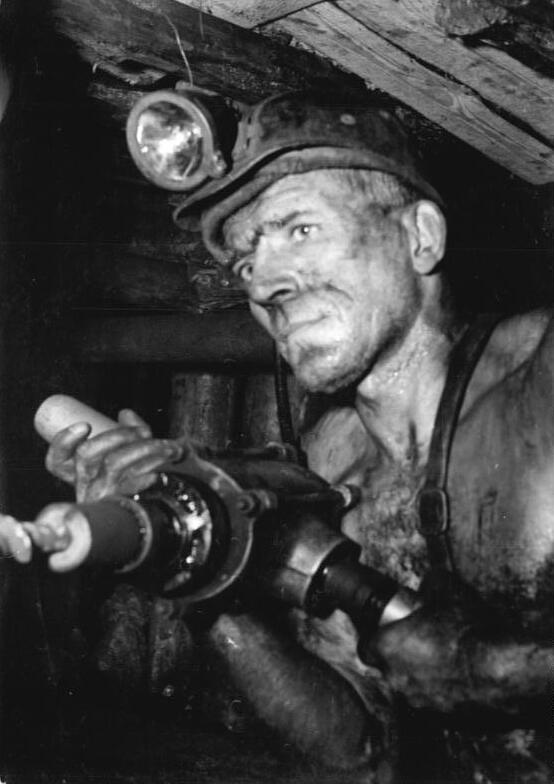 Bergarbeiter bohrend Zentralbild Sturm 16.1.1952 Lehrlinge unter Tage.Der praktische Unterricht der Lehrlinge des Karl Liebknecht-Schachtes im Zwickau-Ölsnitzer Steinkohlenrevier ist vor Ort unter Tage.Die Lehrausbilder, Kumpel und Steiger, bemühen sich, den Jüngsten des Schachtes ihre Erfahrungen zu vermitteln und mit den Kniffen ihrer Arbeit vertraut zu machen.UBz: Ihm sind die Lehrlinge ds Karl Liebknecht-Schachtes anvertraut.Er ist von Beruf Steiger und heisst Kollege Renner.